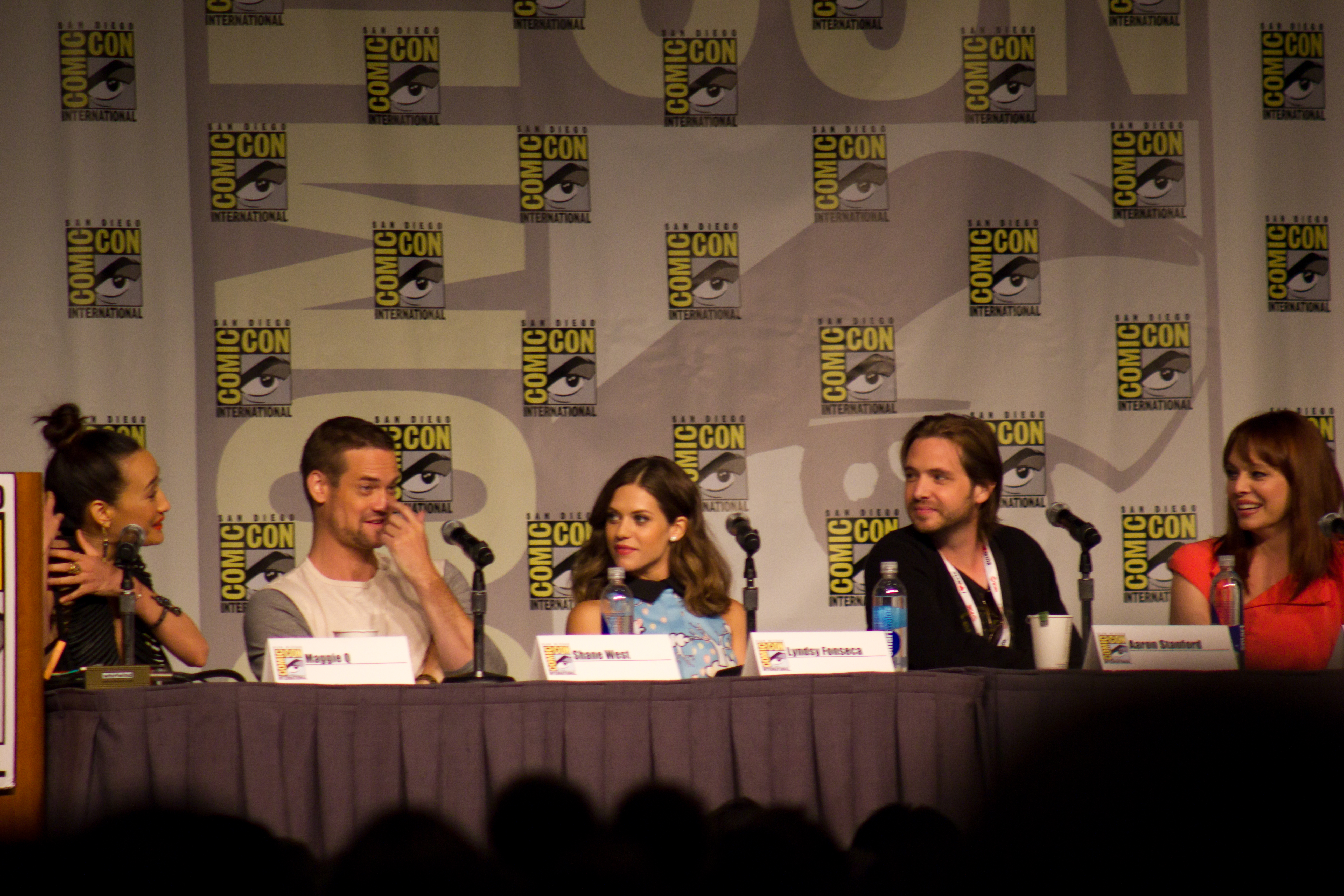 Nikita cast